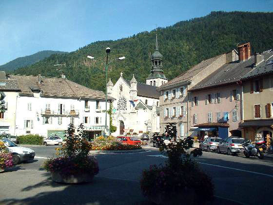 Thônes